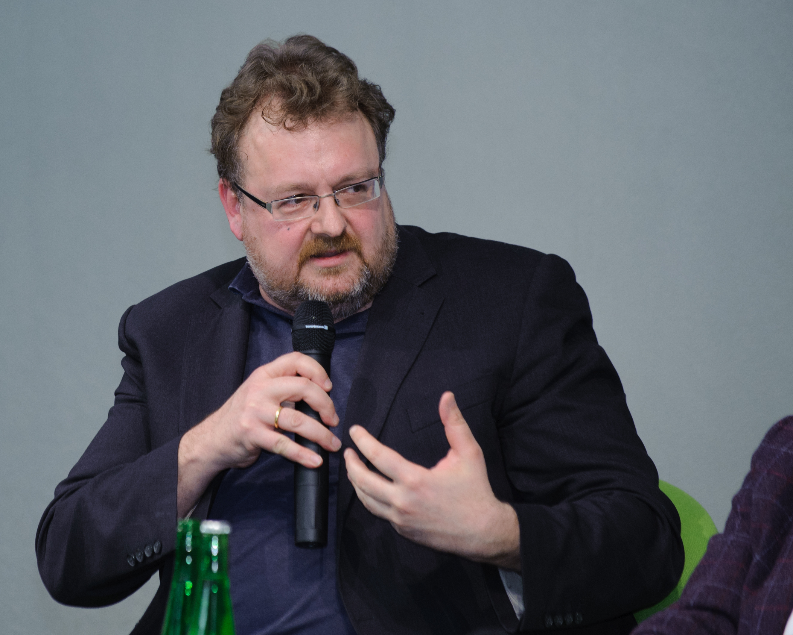 Jürgen Kaube, FAZ Foto: Stephan Röhl